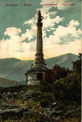 Statuia lui arpad (sec 19.) - Árpád emlékmű a 19. században